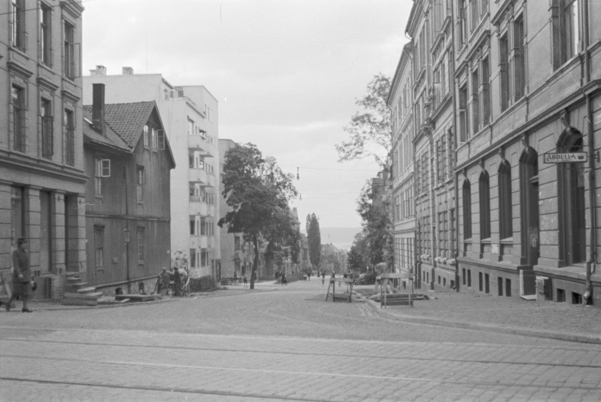 Gabels gate like nedenfor Frognerveien. Hjørnegården og trehuset ble revet på 1960-tallet til fordel for den funkisgården som nå har adresse Frognerveien 22. Beskrivelse i Digitalt museum: «Gabels gate fra krysset ved Frognerveien. Sannysnligvis fra krigsårene. Trehuset, samt hjørnegården til venstre har adresse Frognerveien. Begge bygninger ble revet på 1960-tallet og erstattet med moderne boligblokker.» Ukjent fotograf. Fra Oslo byarkivs samling.